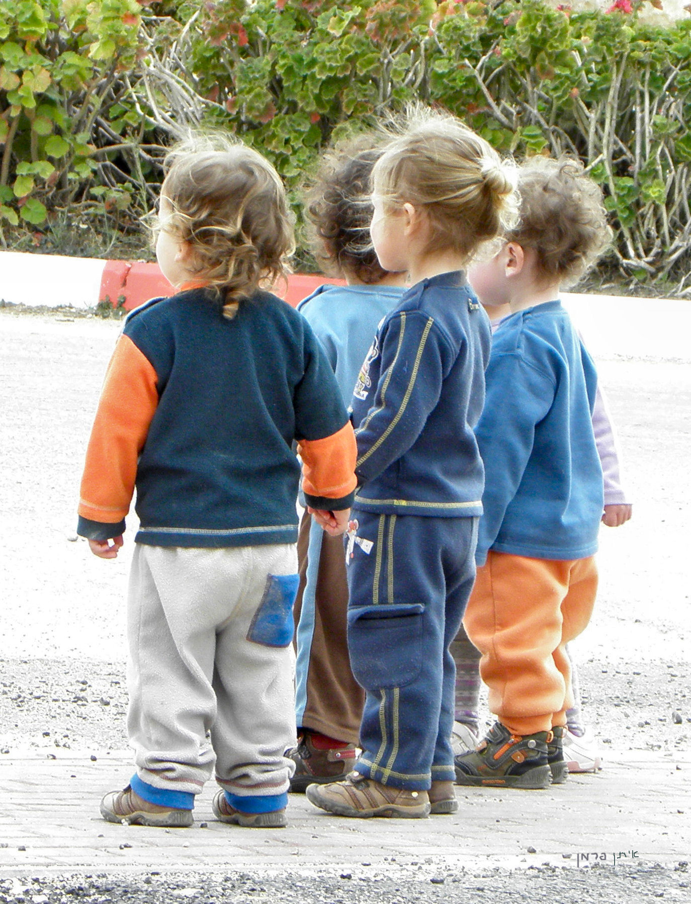 ילדים בכרמל todlers